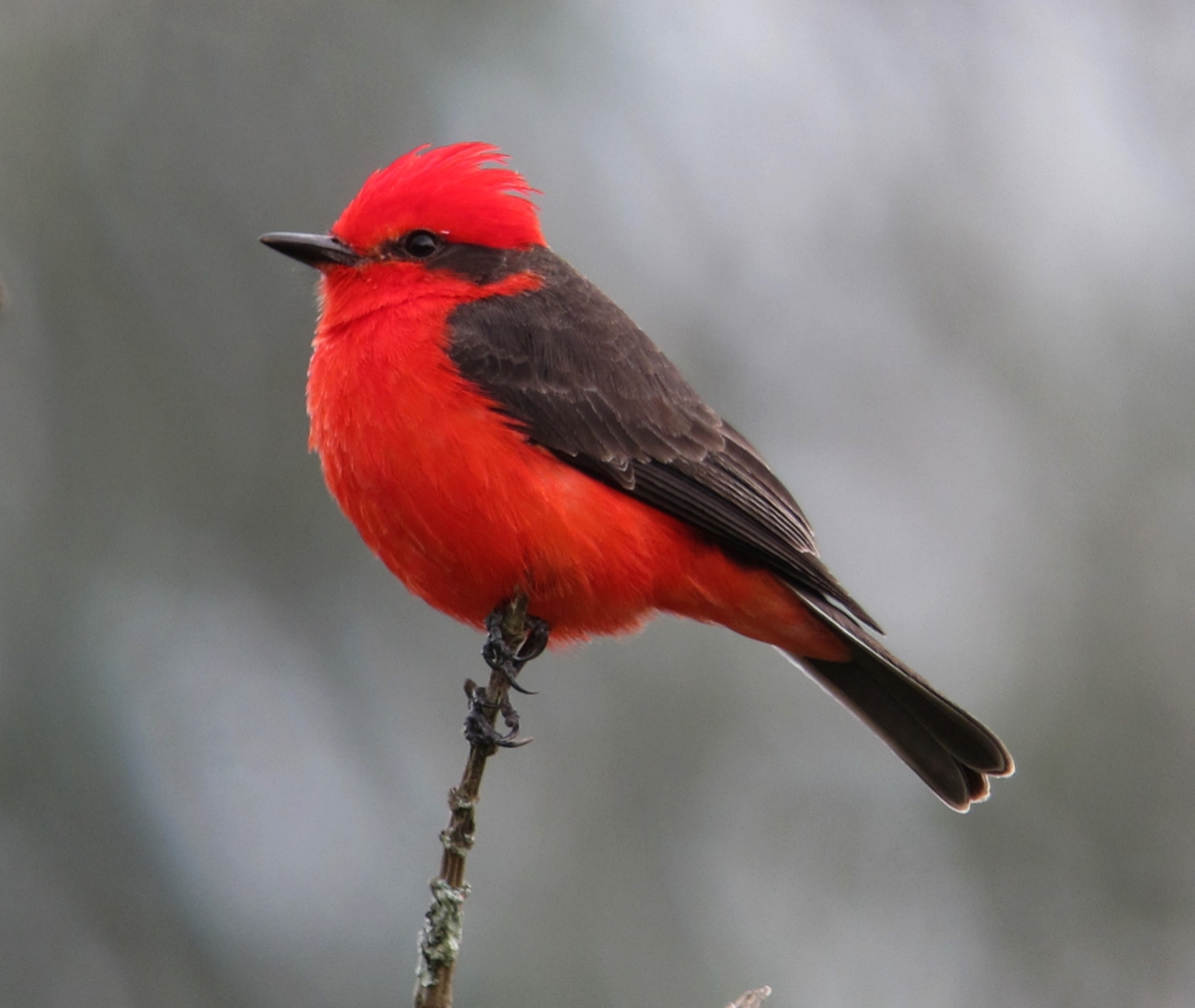 Rionegro, Antioquia, Colombia